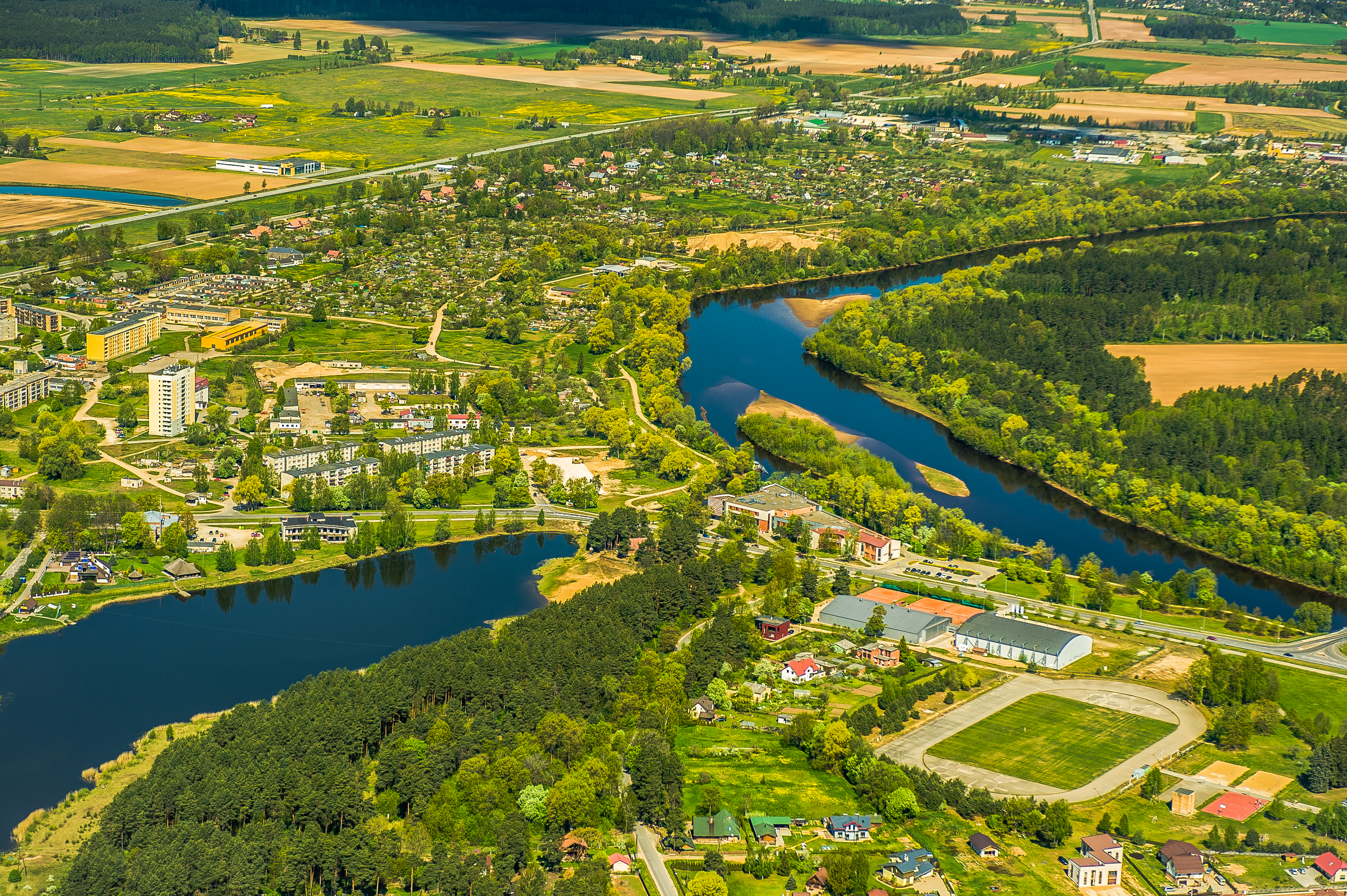 Ādažu centrs no augšas